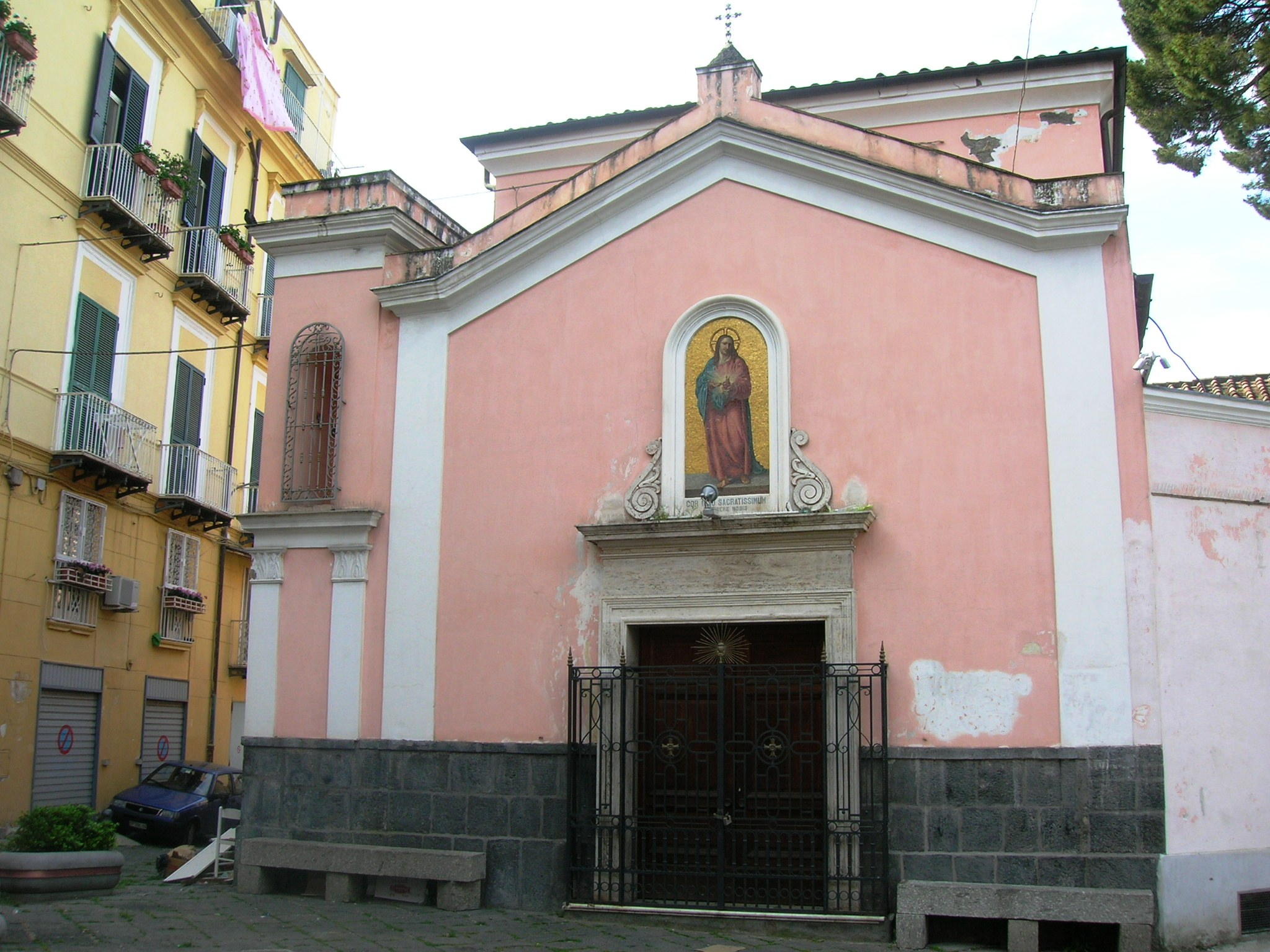 Facciata della chiesa dell'Oratorio di Castellammare di Stabia